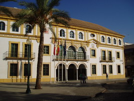 Ayuntamiento de Dos Hermanas (Sevilla), España.